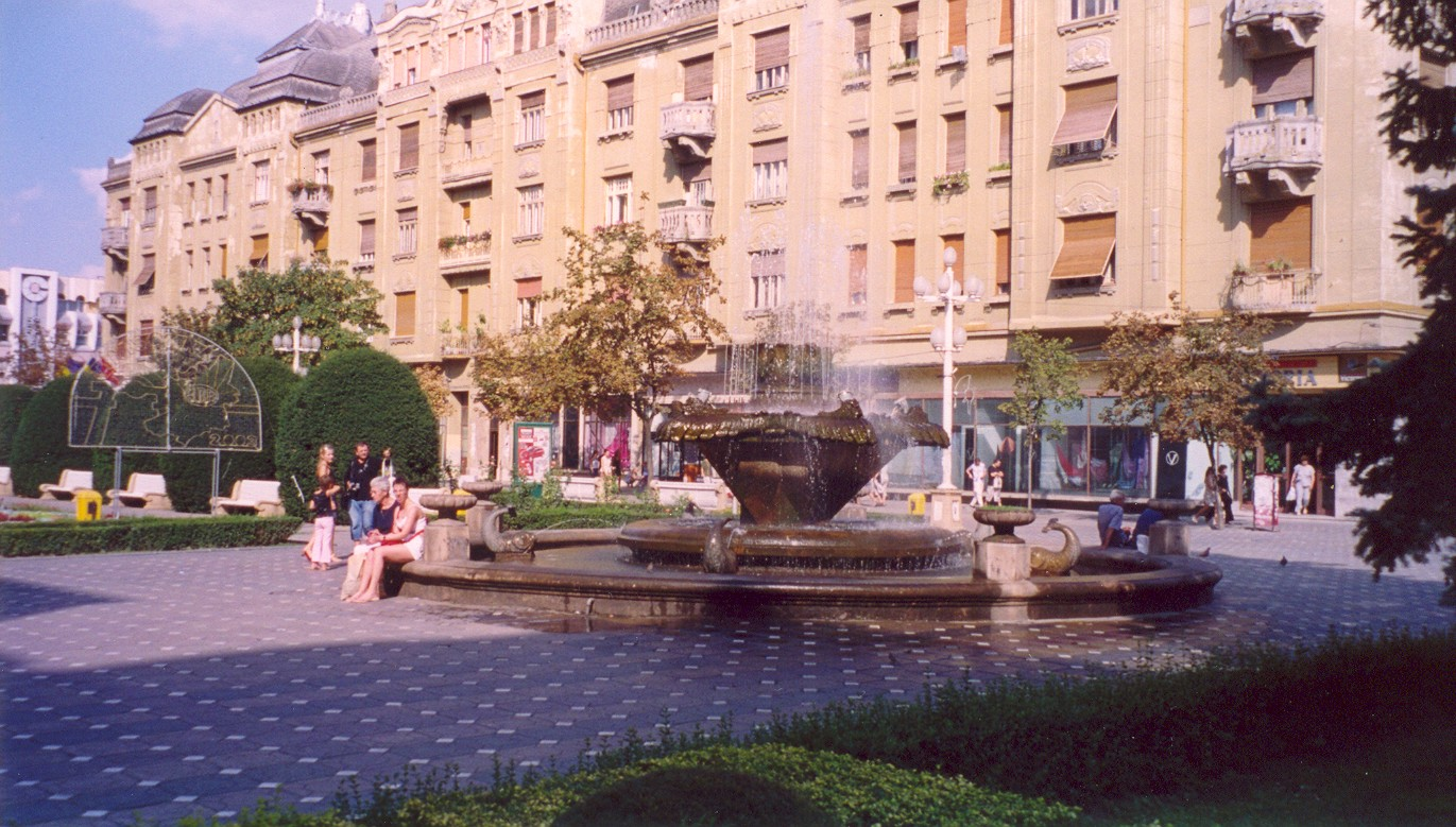 Fischbrunnen (Temeswar)